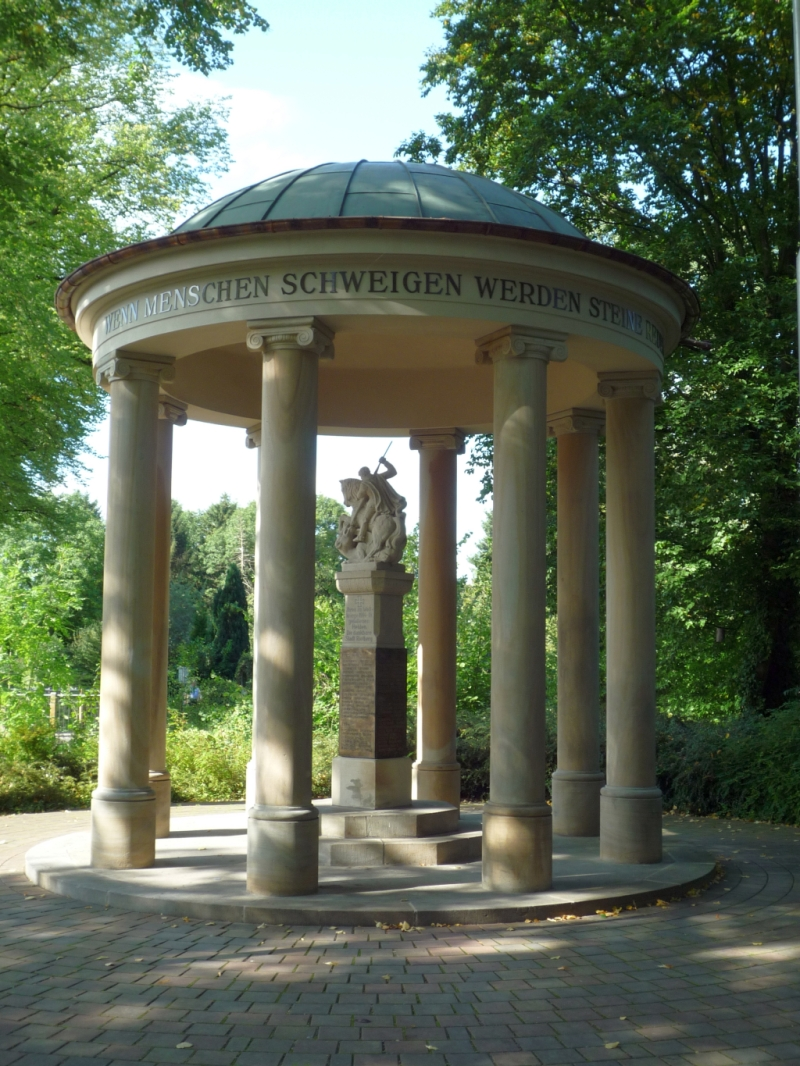 Rietberg, Kriegerdenkmal 1914-1918, Teil der Gesamtanlage für die beiden Weltkriege